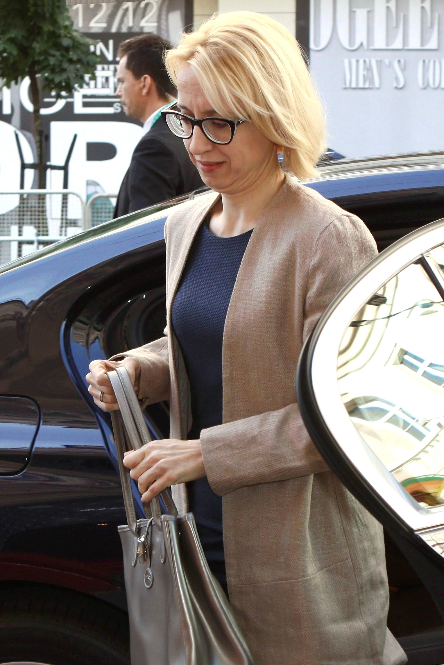 dr hab. Teresa Czerwińska, ekonomistka i urzędniczka państwowa.